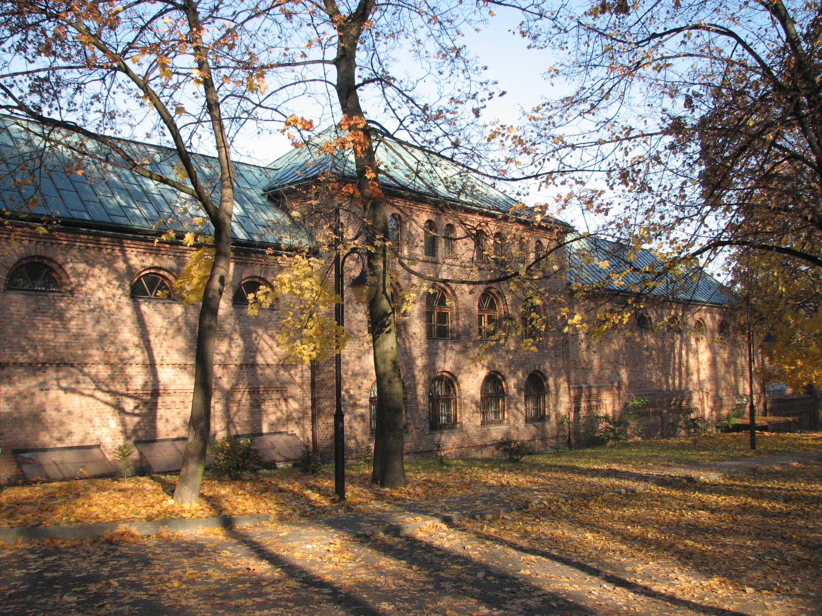 Academic Chaplaincy in Katowice Panewniki (Franciscan monastery)